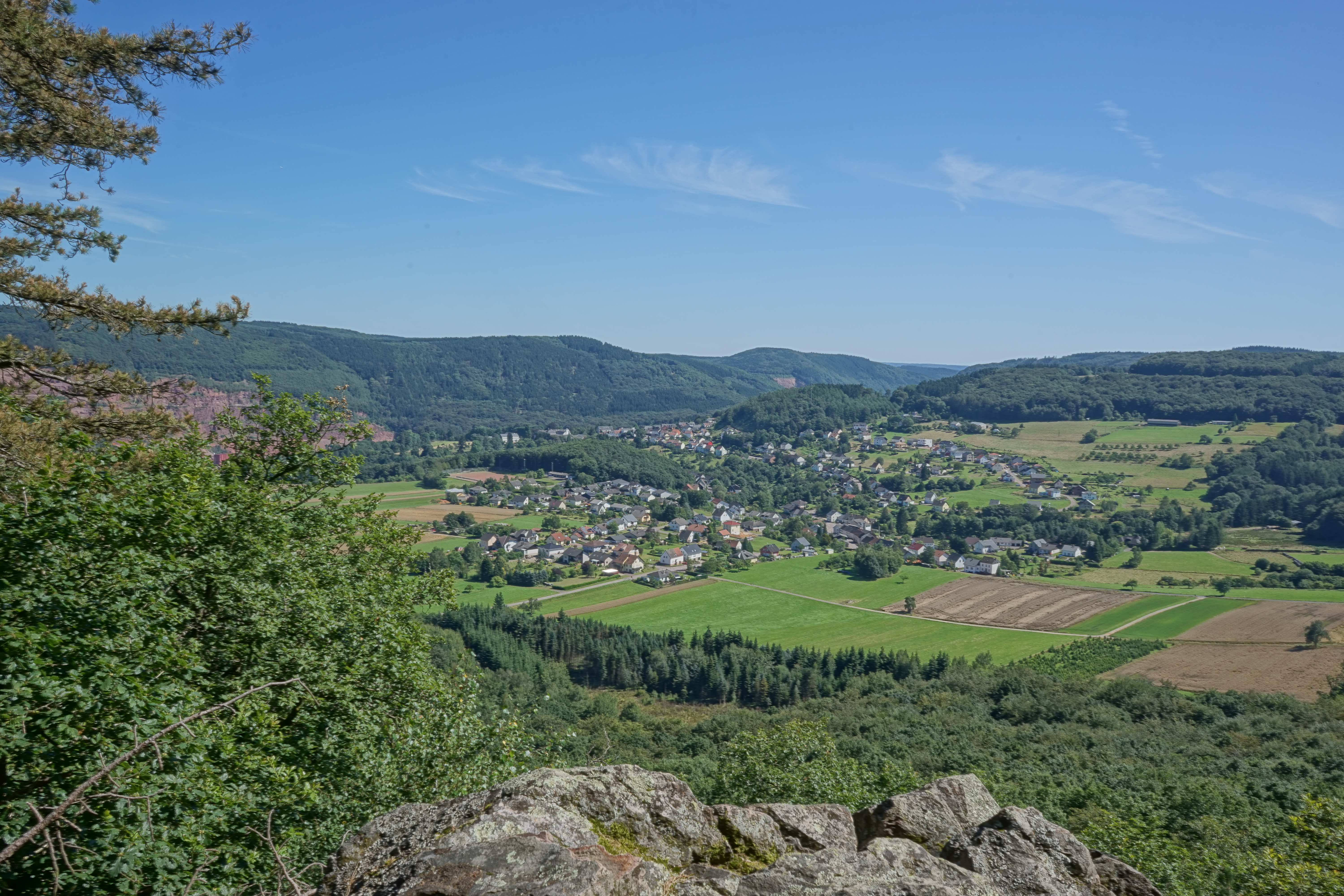 Blick auf Taben-Rodt aus nordwestlicher Richtung (Aufnahme vom August 2016)